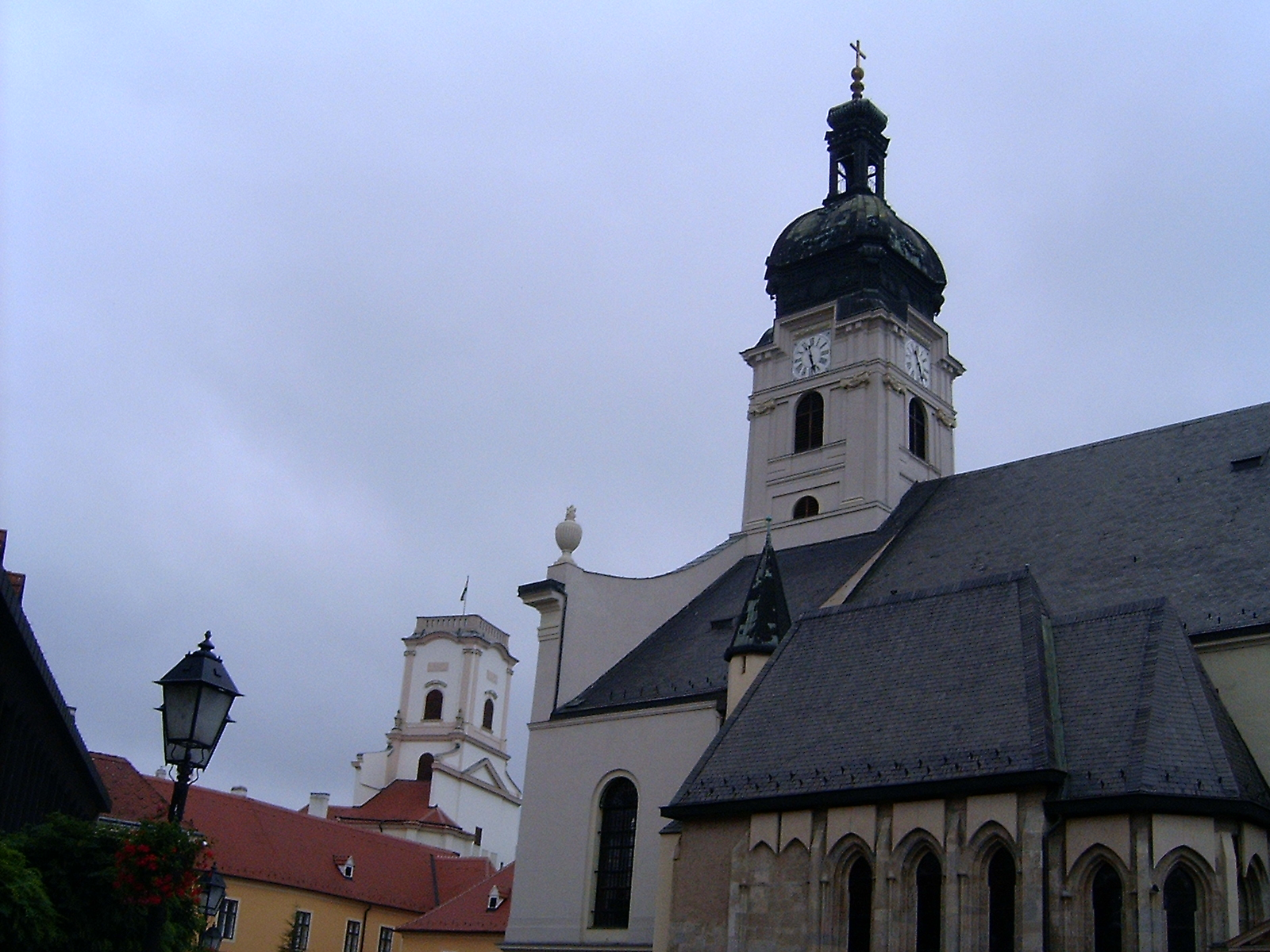 Püspökvár_és_bazilika Győrben